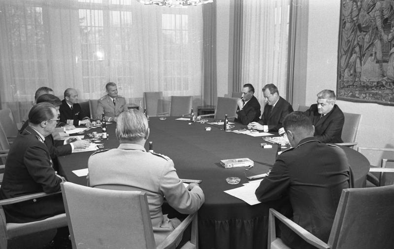 Bundeswehrführung bei Bundeskanzler Brandt in Bonn